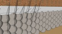 Het schematische overzicht bij vertikale grondinjectie